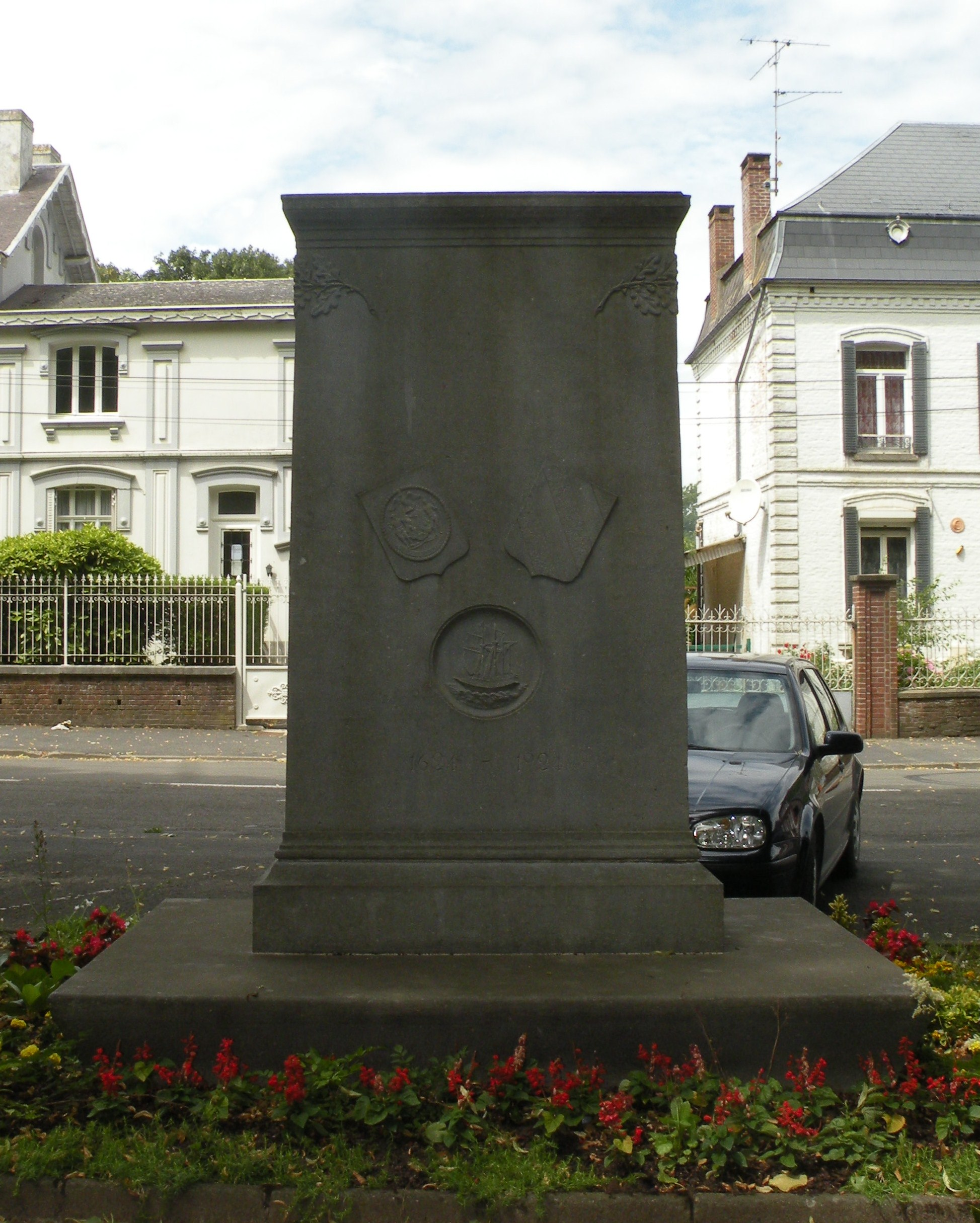 memorial de jesse de forest à Avesnes-sur-Helpe